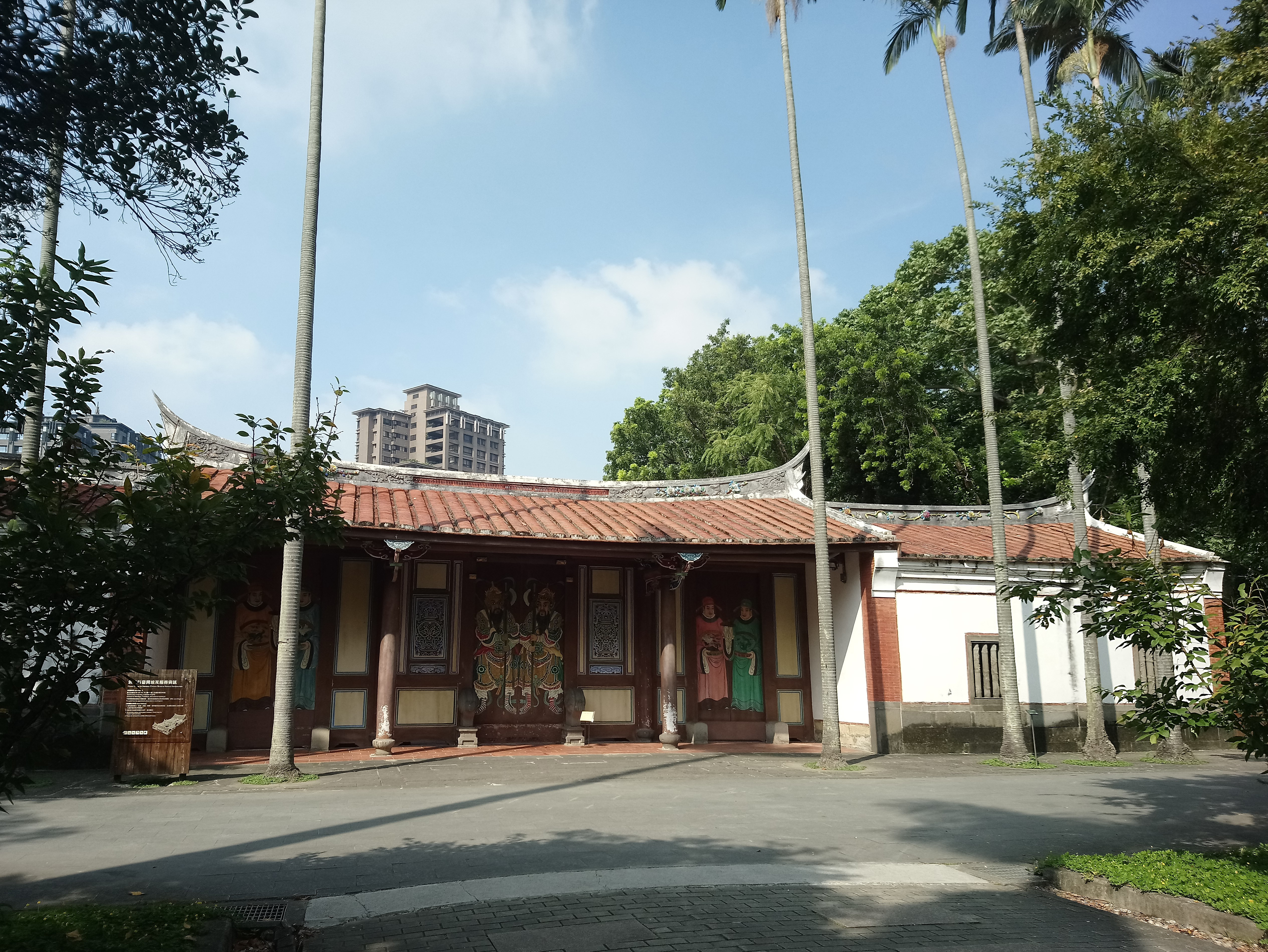 欽差行臺,臺北市中正區南門次分區南門里